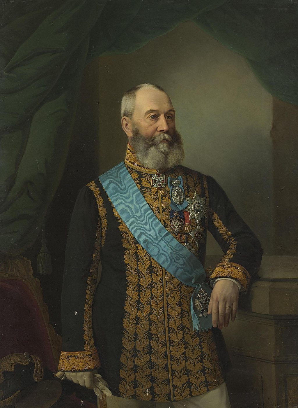 Князь Па́вел Па́влович Гага́рин (1789, Москва — 1872, Санкт-Петербург) — действительный тайный советник 1-го класса из княжеского рода Гагариных, внук С. В. Гагарина. Председатель Комитета министров Российской империи (1864—1872).